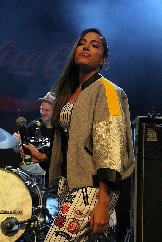 Anitta para Coca Cola Jeans.